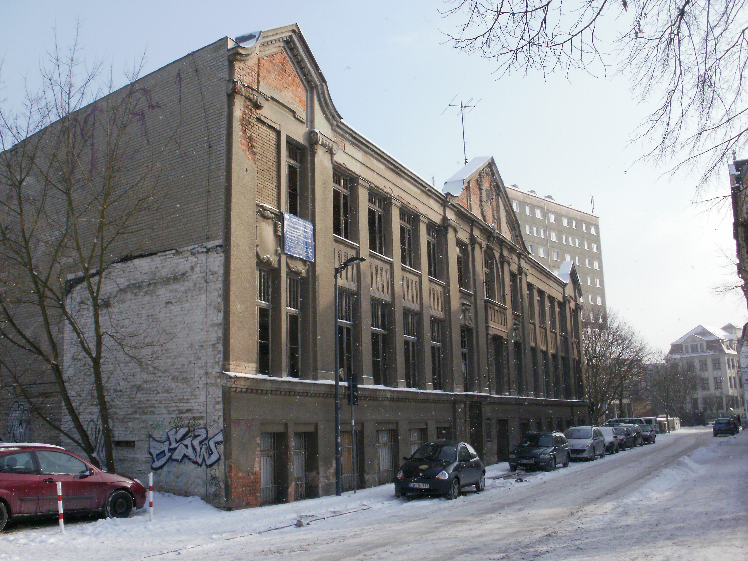 Fabrikgebäude der ehemaligen Firma W. Michowius, Lieberoser Straße 35/36